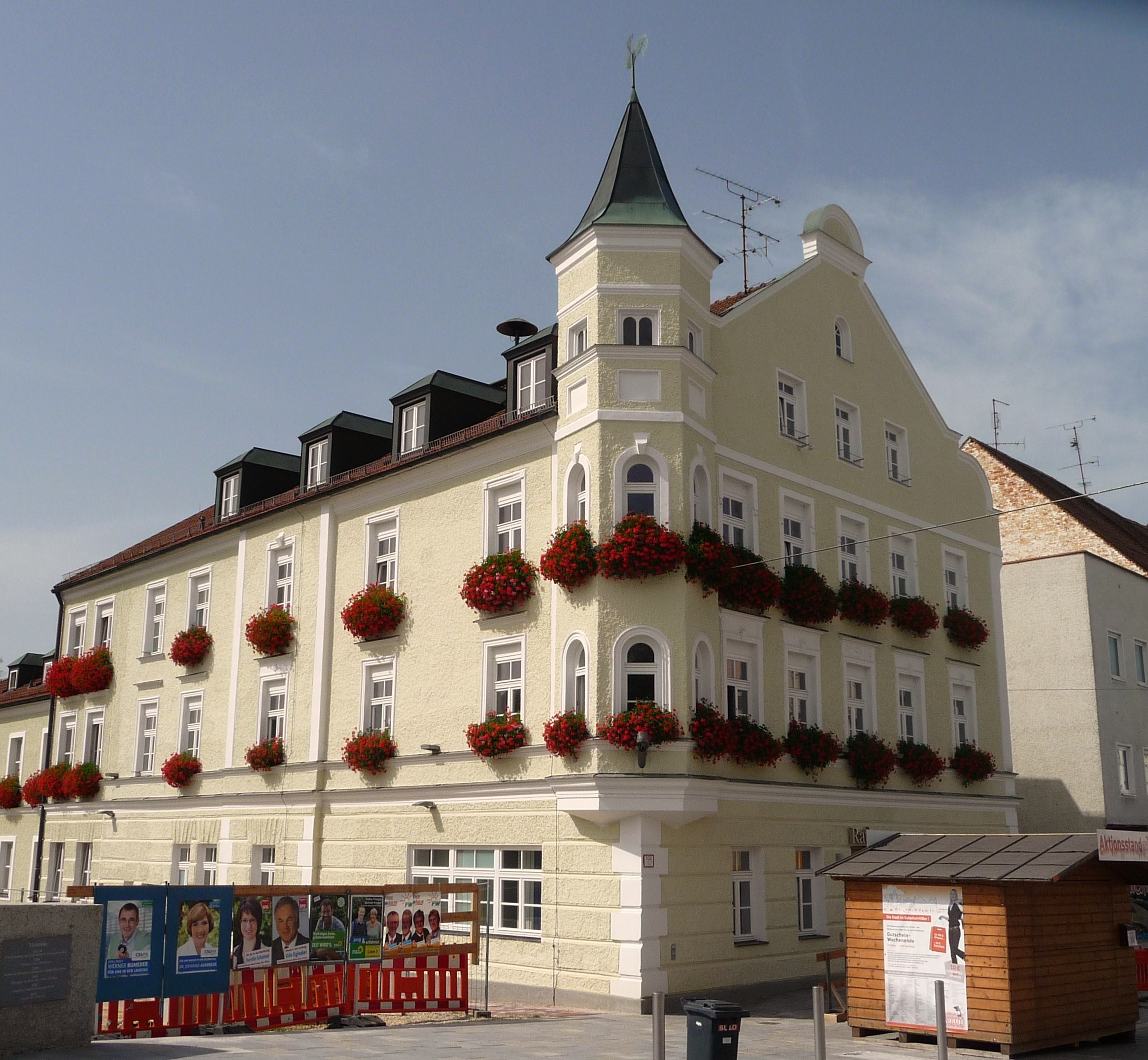 Das Rathaus von Vilsbiburg, erbaut 1705, 1903 umgebaut.